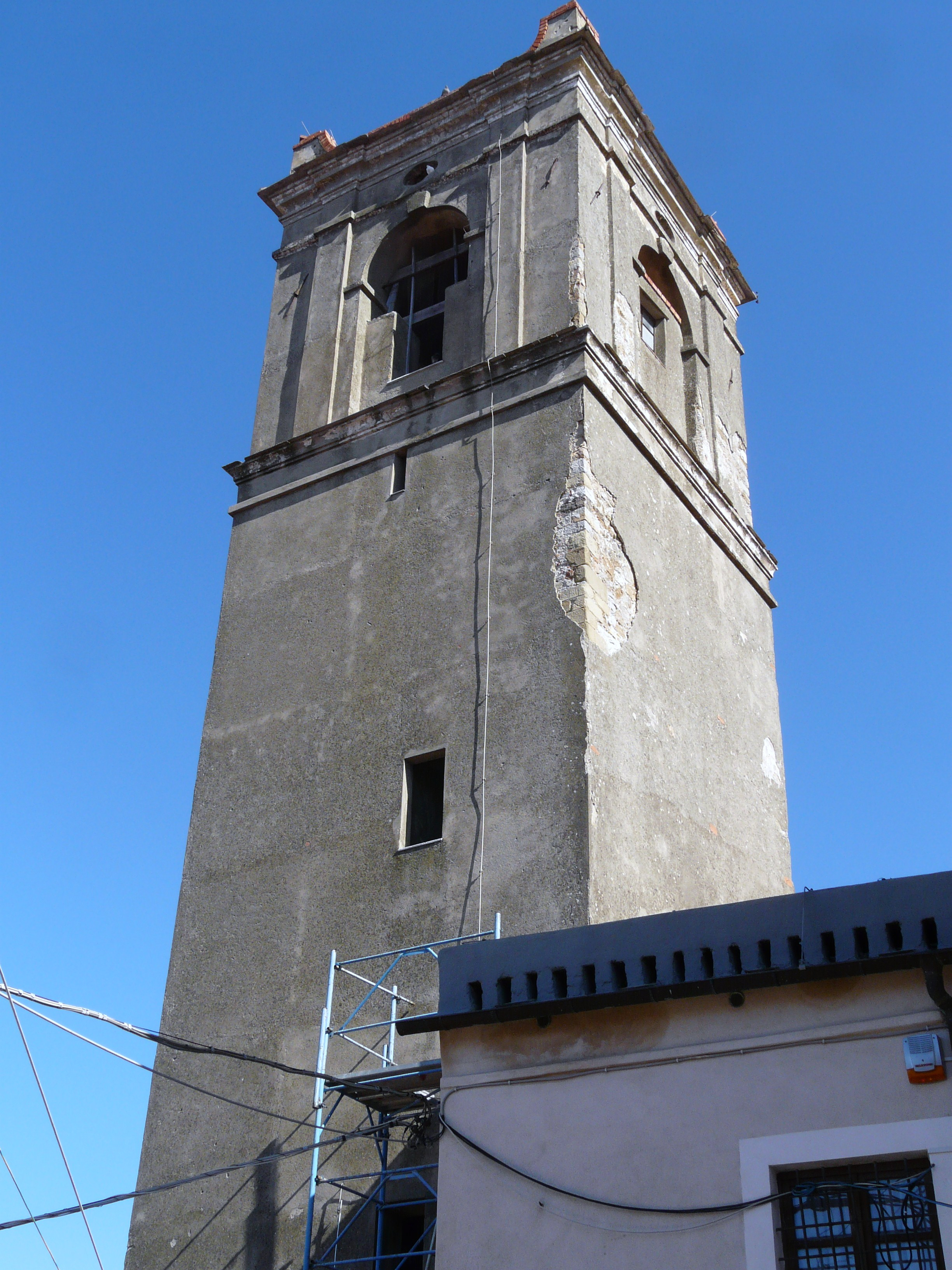 Campanile della pieve di San Michele, Ponzano Superiore, Santo Stefano di Magra, Liguria, Italia